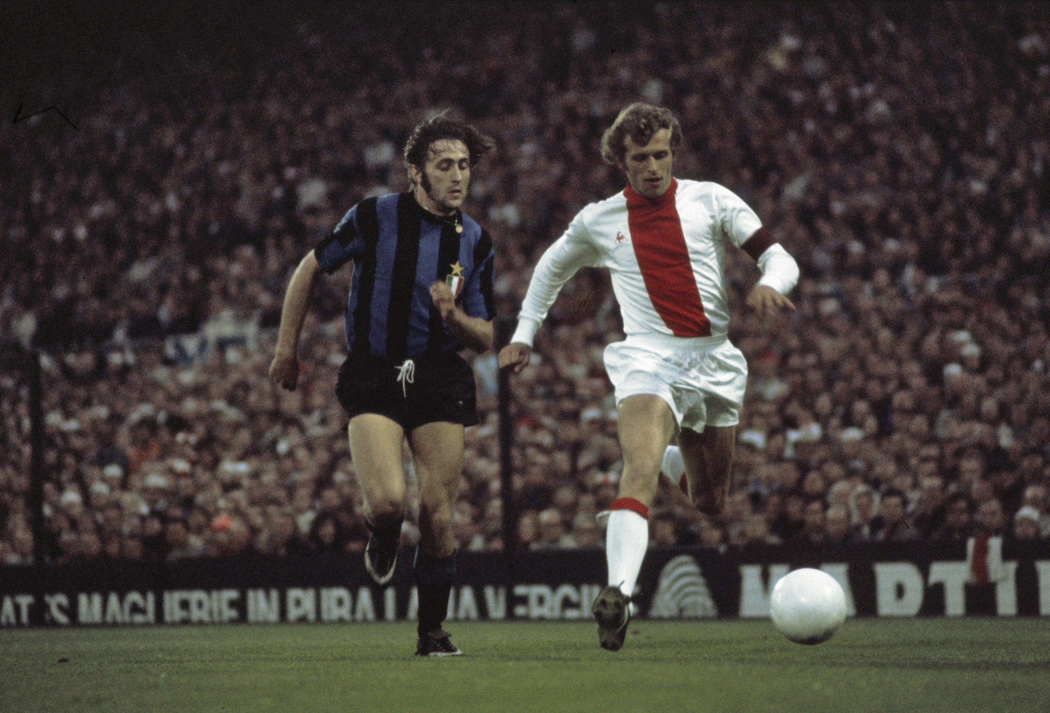 Finale Europacup I in Feijenoord stadion: Ajax tegen Inter Milaan 2-0; Mauro Bellugi (links) en Piet Keizer (rechts) in aktie.